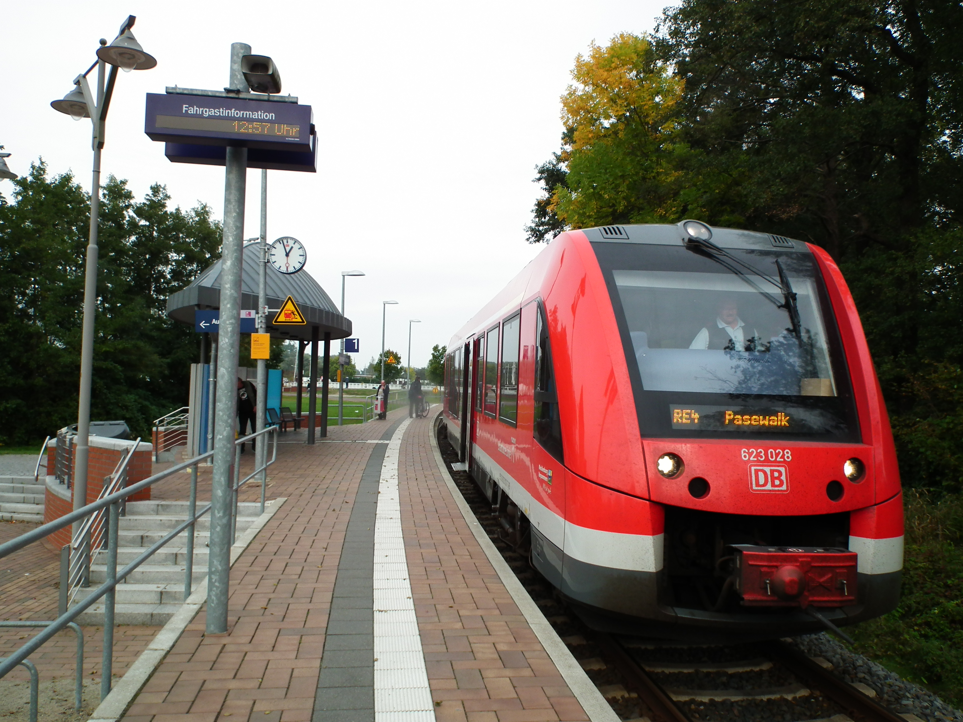 Wkroujście w 2017r.